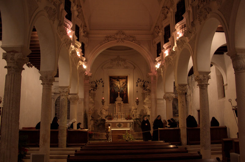 Zadar - Unutrasnjost crkve Svete Marije